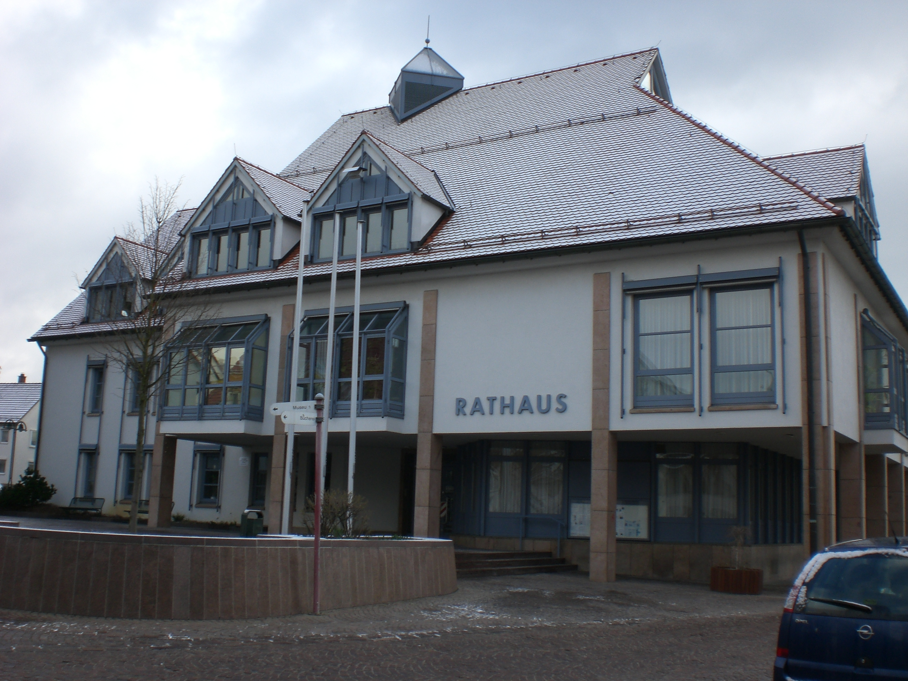 Rathaus Schelklingen, Deutschland.